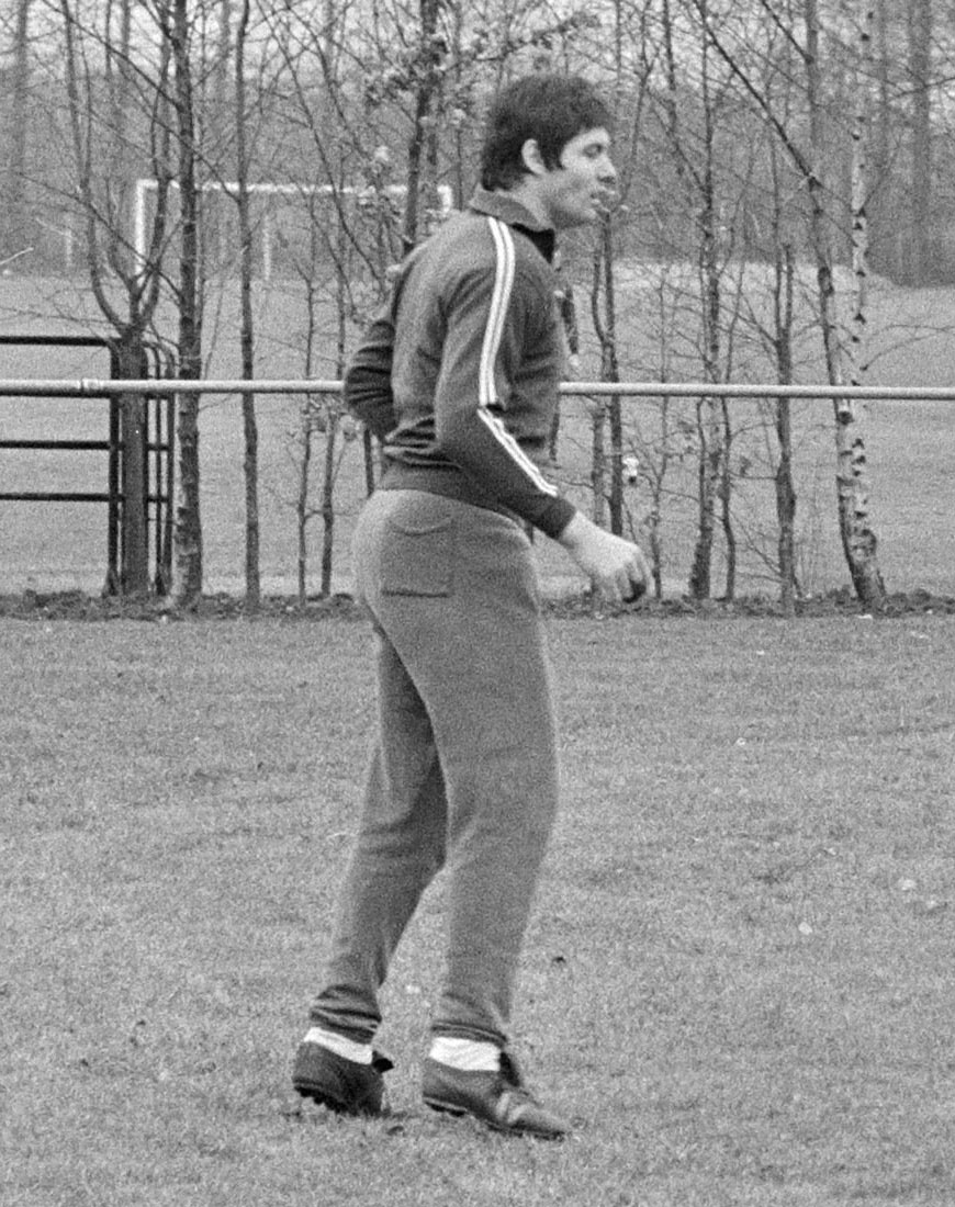 Voetbalclub Juventus (Italie) traint in Enschede; Sandro Salvadore.